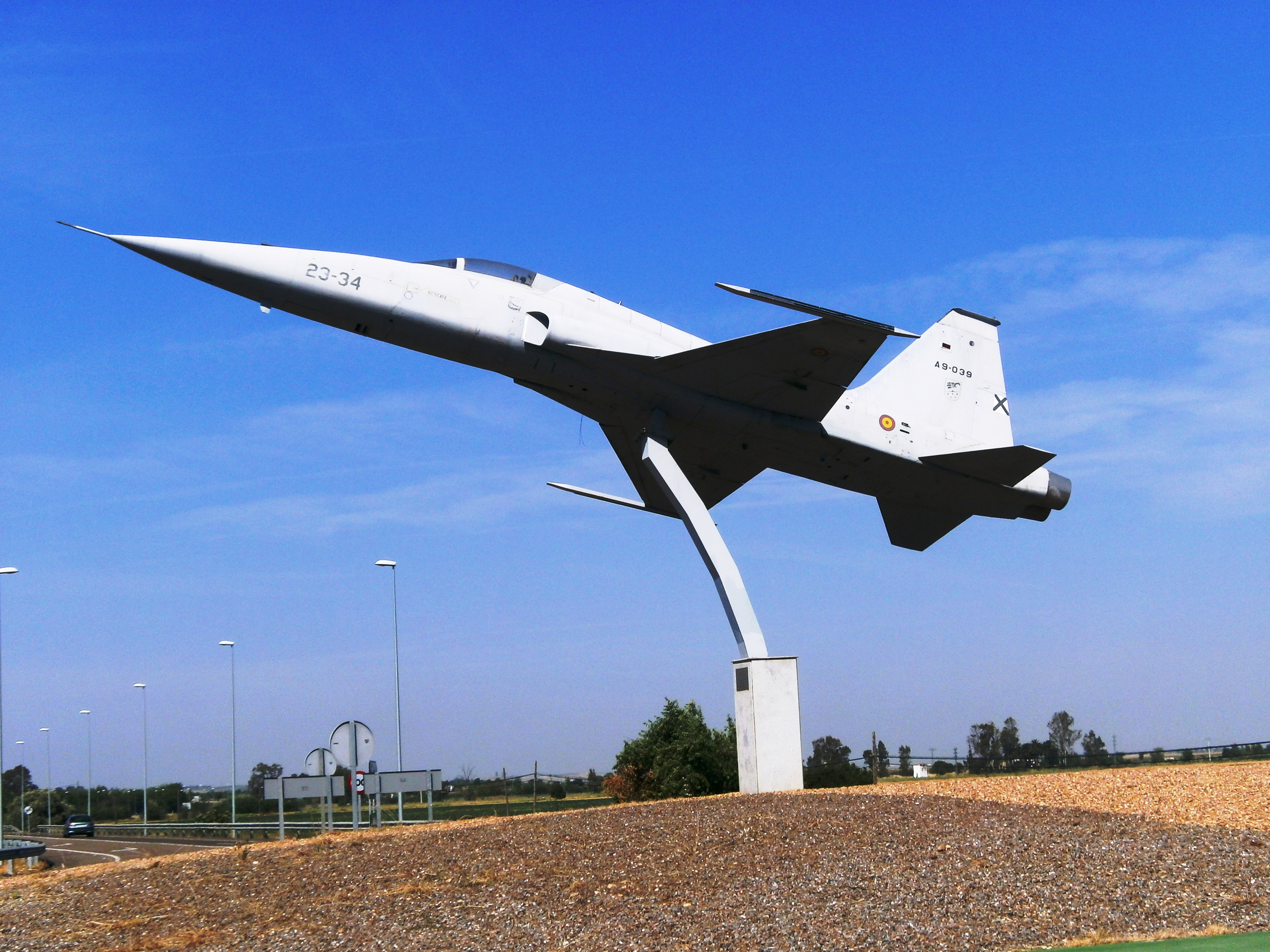 Avión reactor donado por la Base de reactores de Talavera la Real a este pueblo ya que en él se encuentra la Base de Reactores del Ejército del Aire.